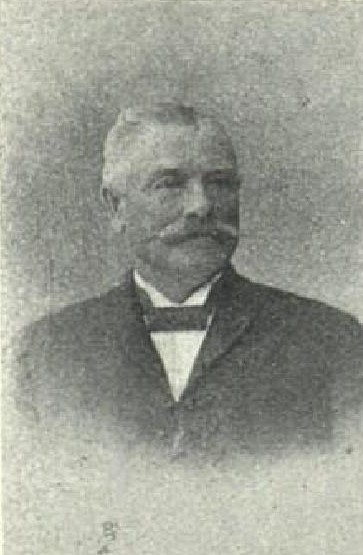 Josef Novotný (1854-? ), rakouský politik české národnosti